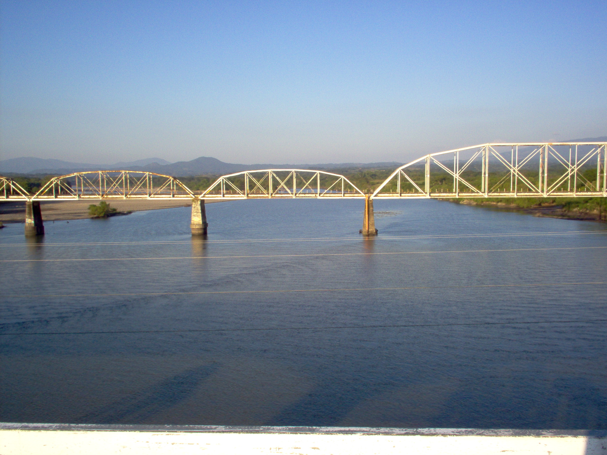 tomada alrededor de las 4:30pm y justamente desde el nuevo